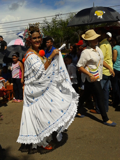 Pollera elaborada con tela blanca Bordada